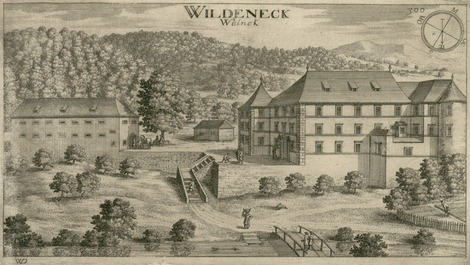 Grad Belnek